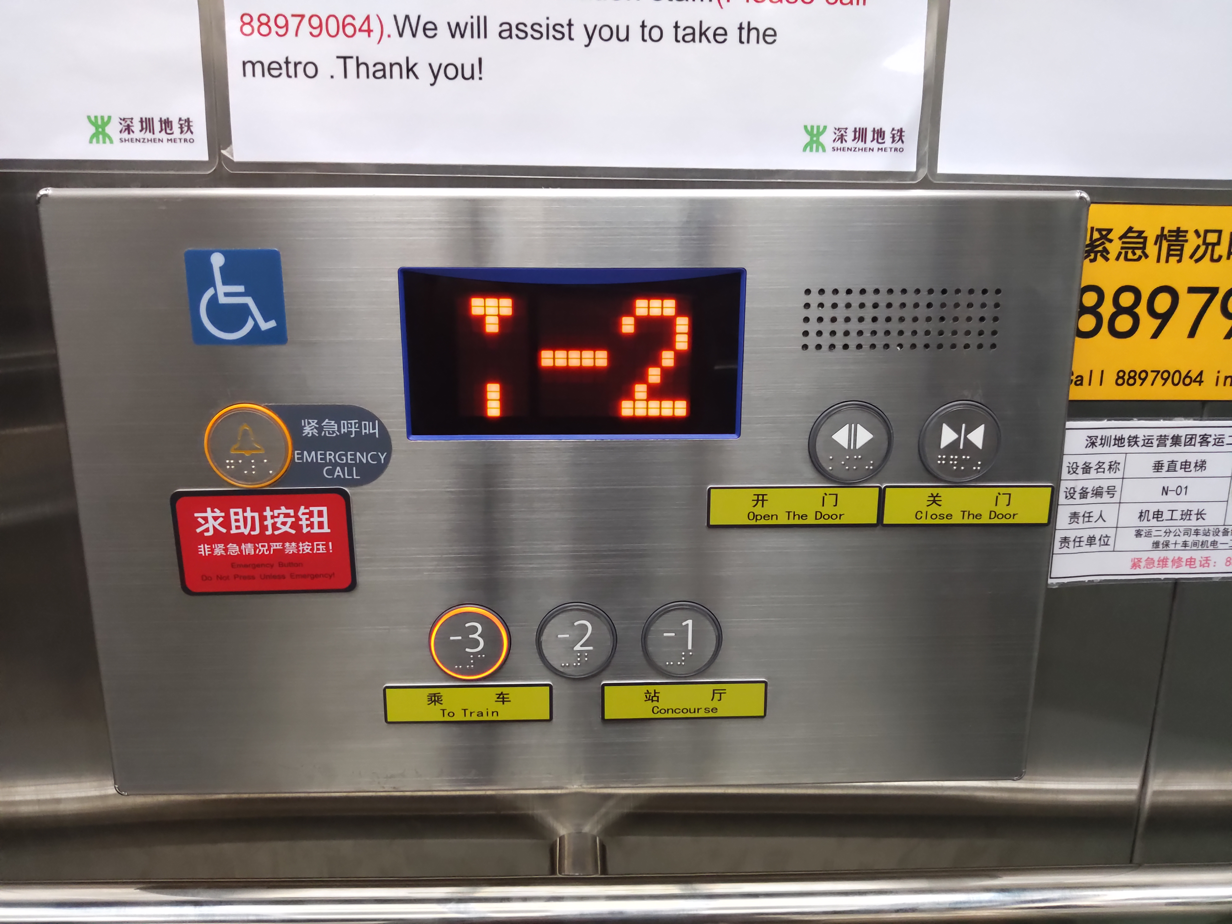 10号线岗厦站直梯 可见10号线站台位于B3